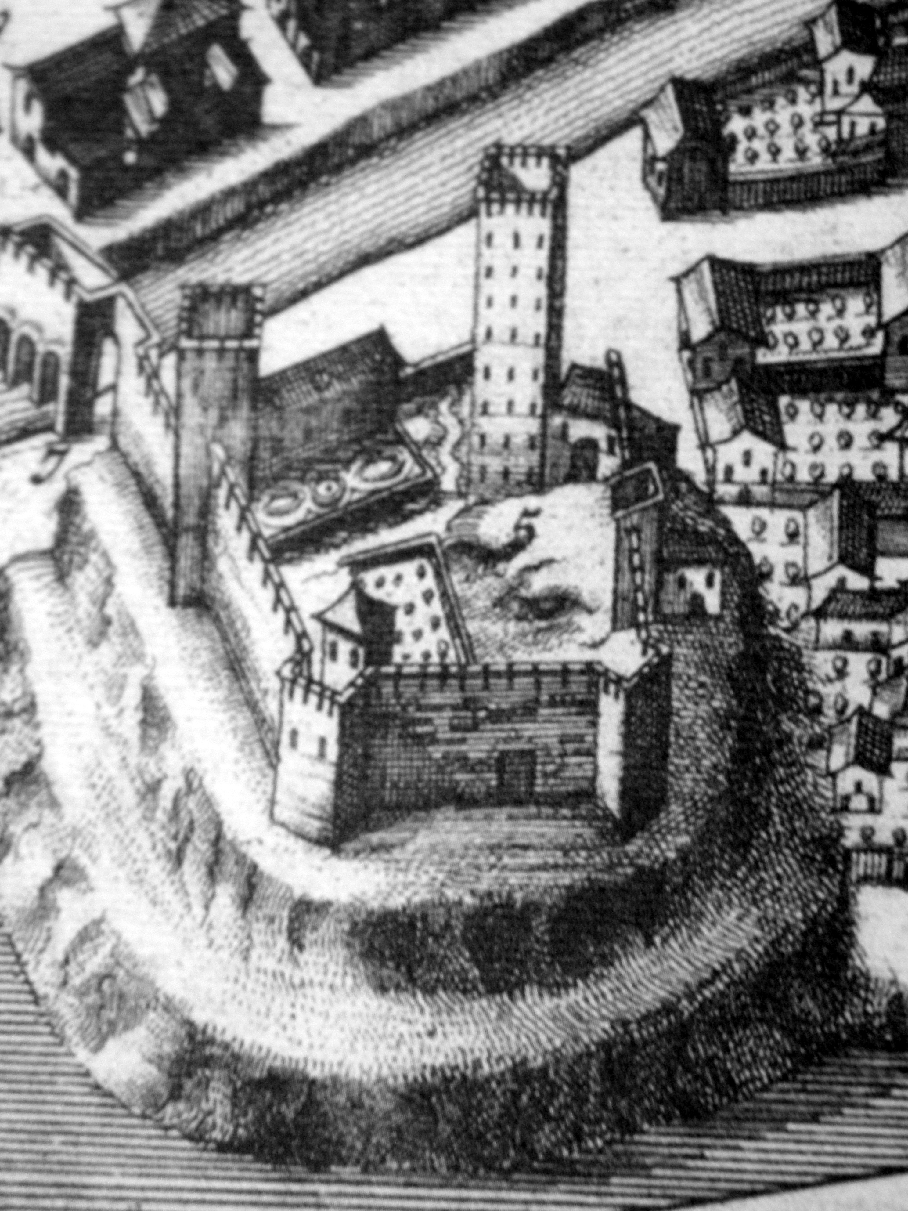 Pierre Mortier; antica mappa di Rovigo: dettaglio, il castello.